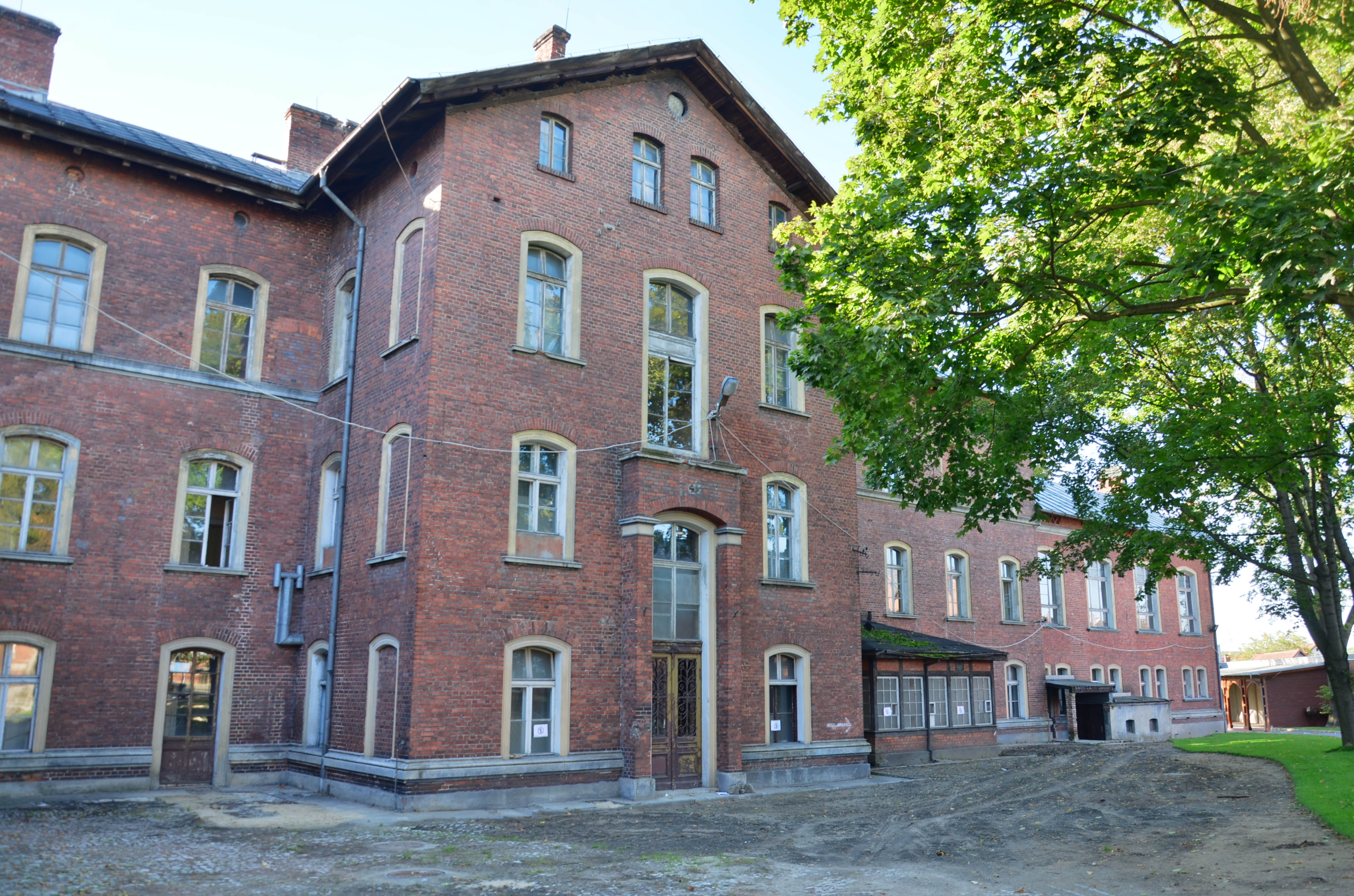 zespół szpitala im. Roberta Kocha Kędzierzyn-Koźle Sławięcice, ul. Orkana 14, Kędzierzyn-Koźle 11.2008.